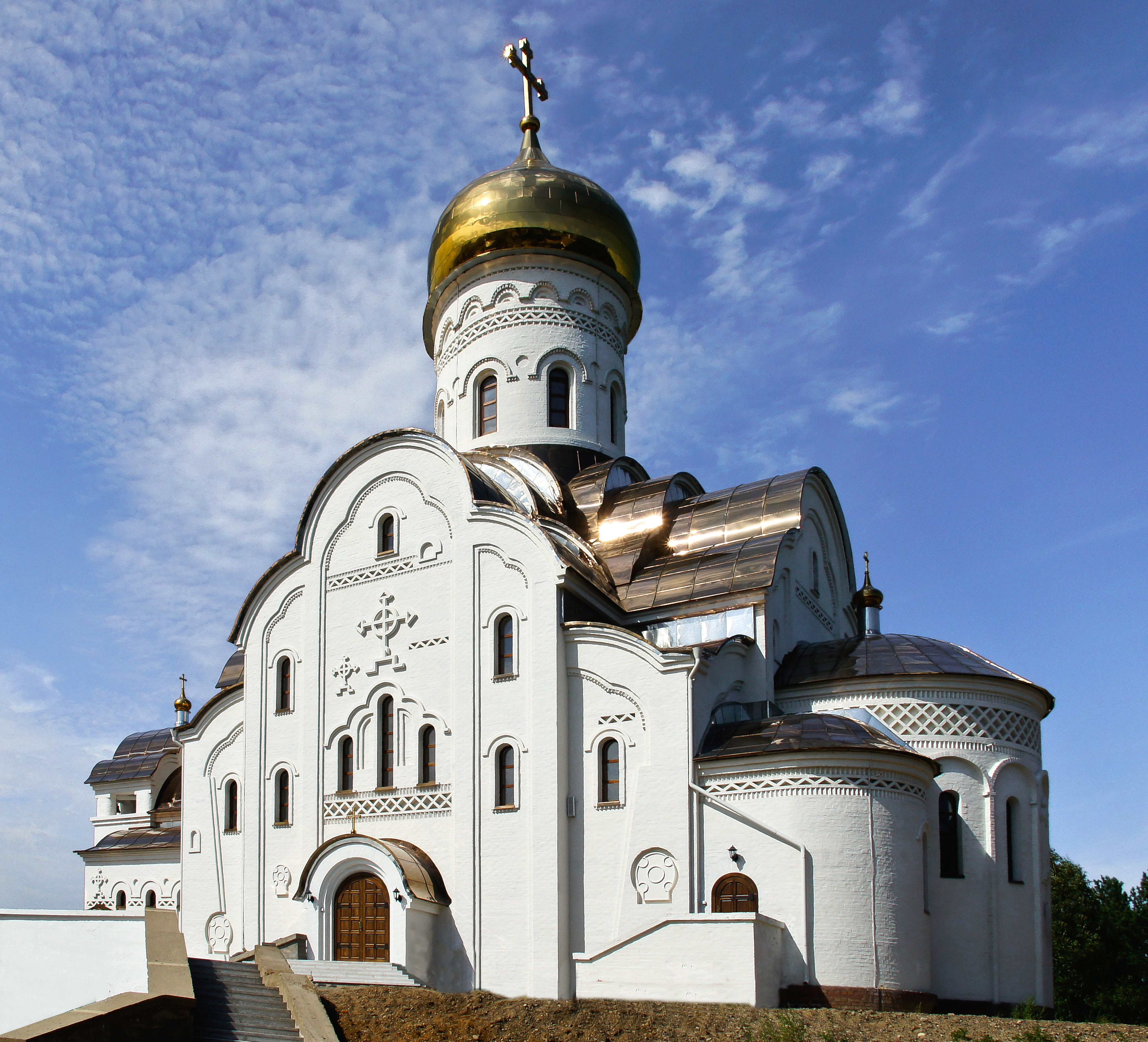 г.Лесосибирск